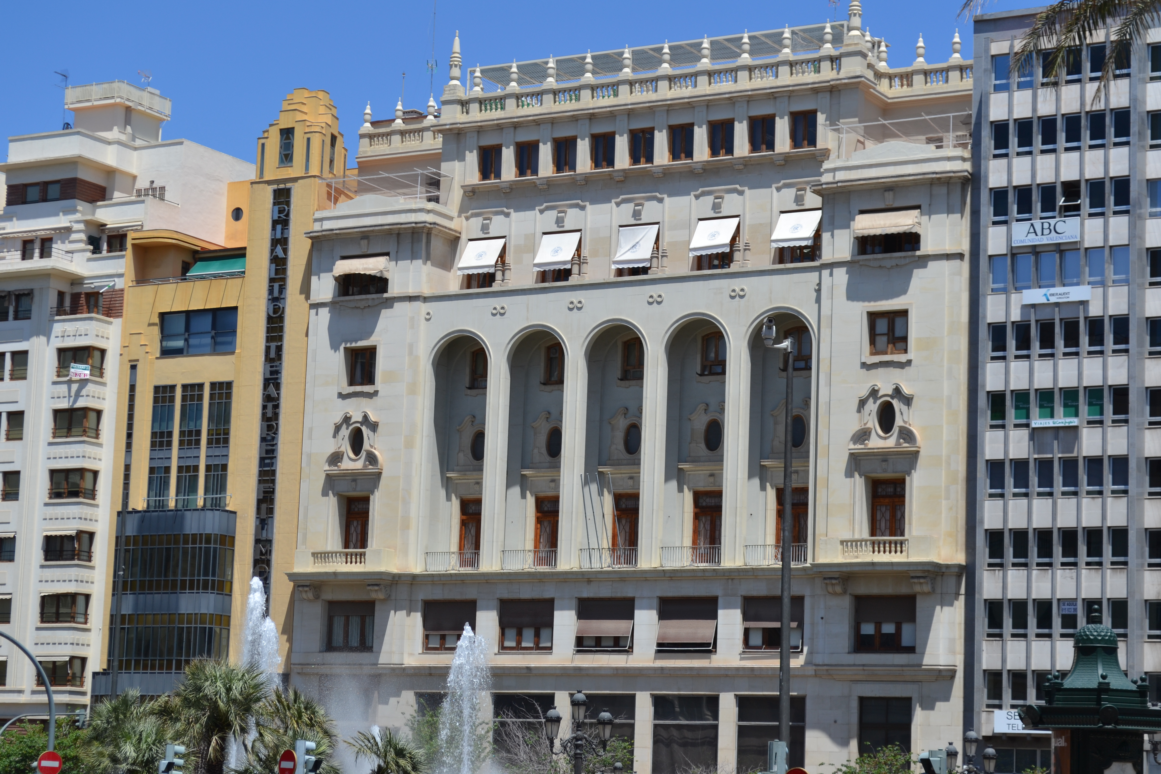 Edificio Rialto y Ateneo mercantil de Valencia.